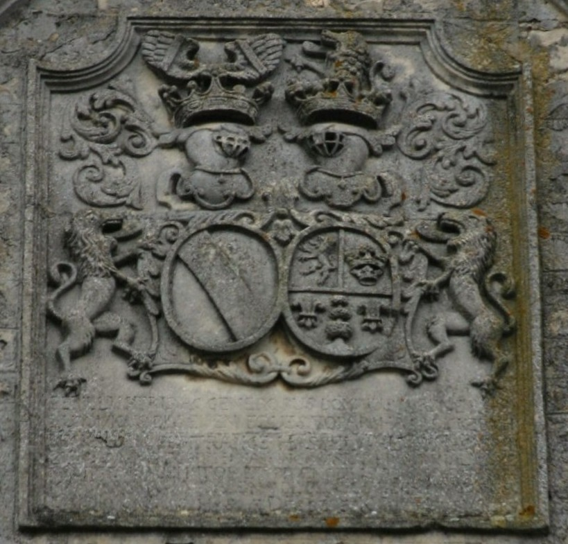 Wopen op der Kierch zu Betten.